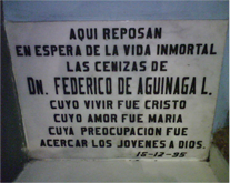 Lápida donde descansan los restos de Don Federico de Aguinaga